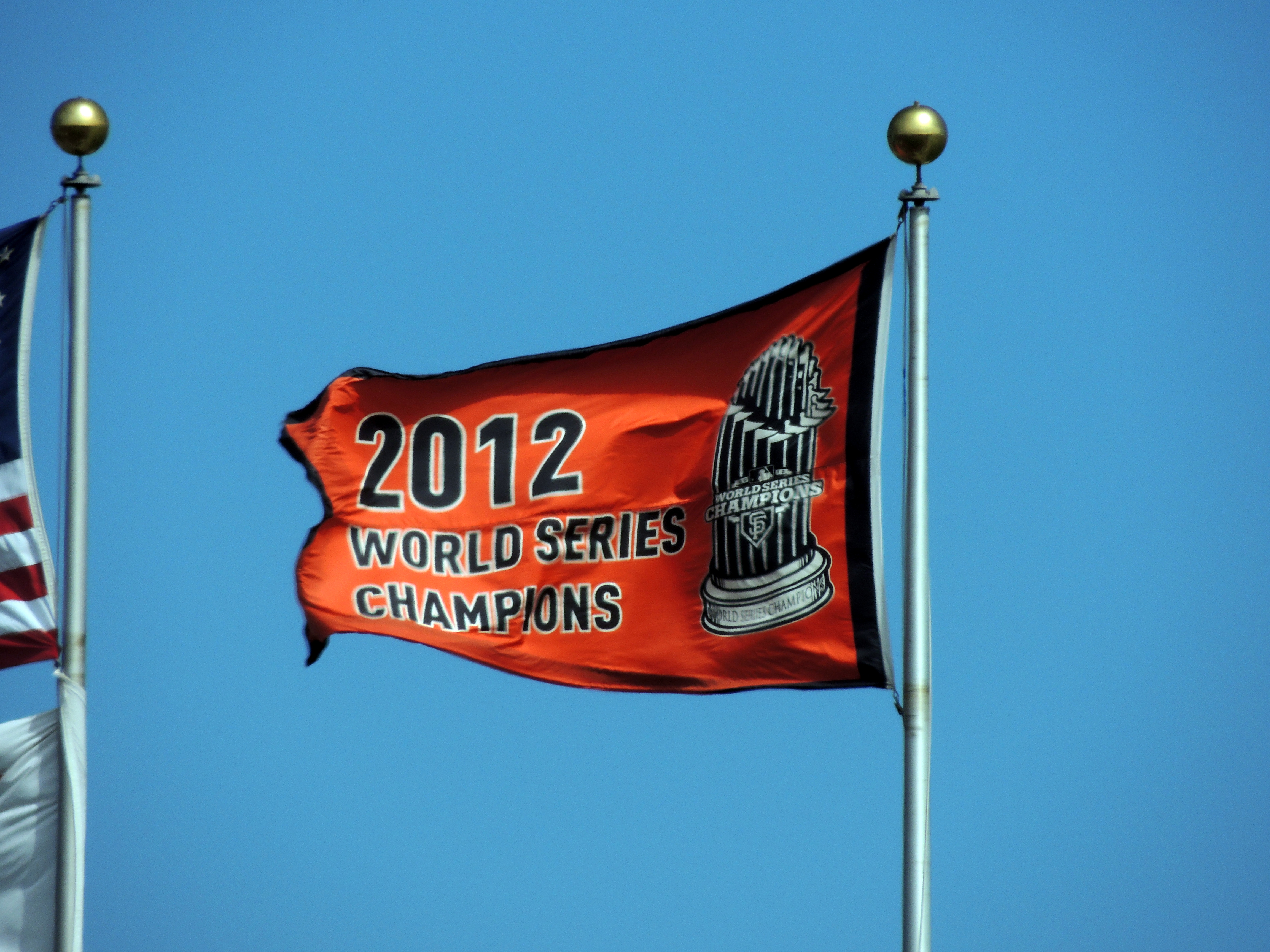 Cubs vs. Giants 7-28-2013